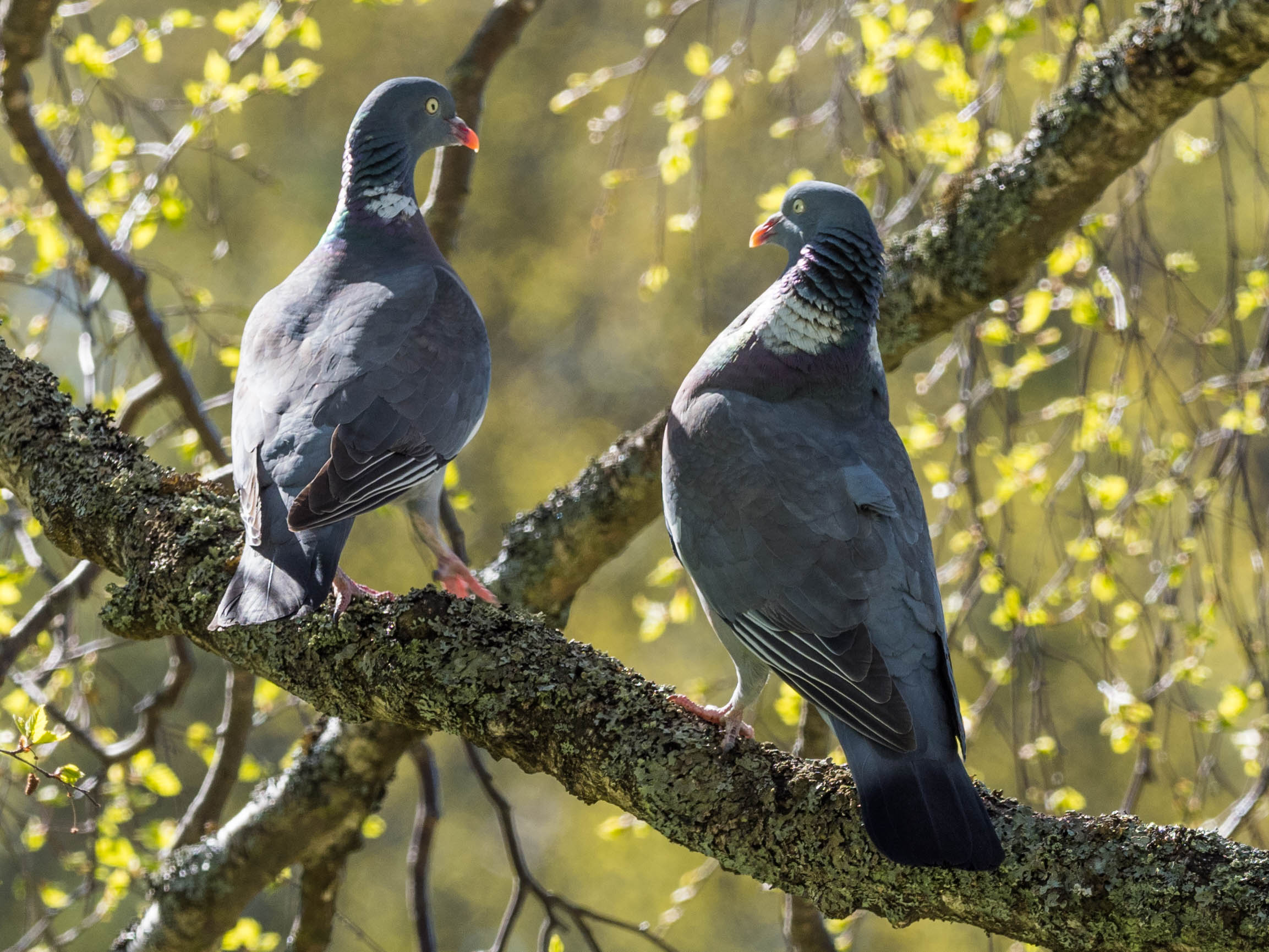 Columba palumbus